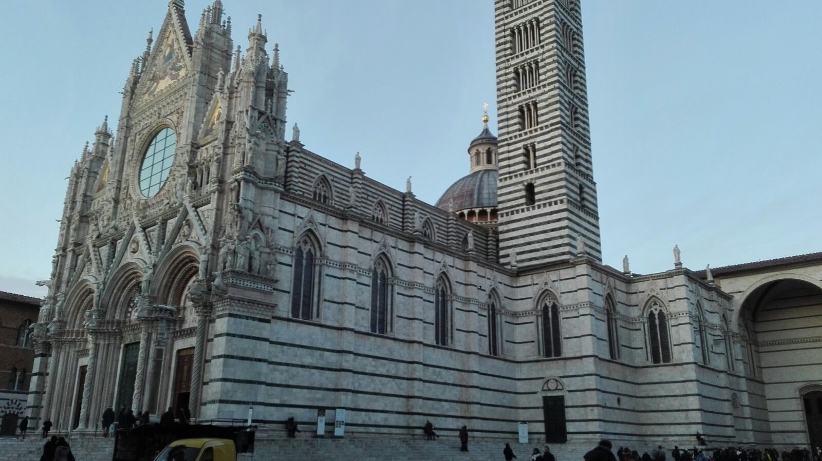 Duomo di Siena